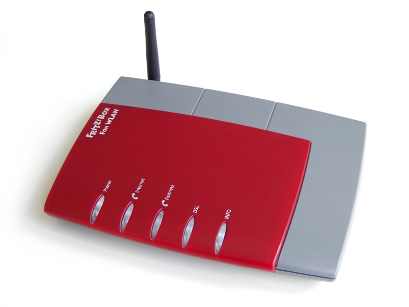 Fritz!Box Fon WLAN 7170, hier in der Rot-Grau-Variante.